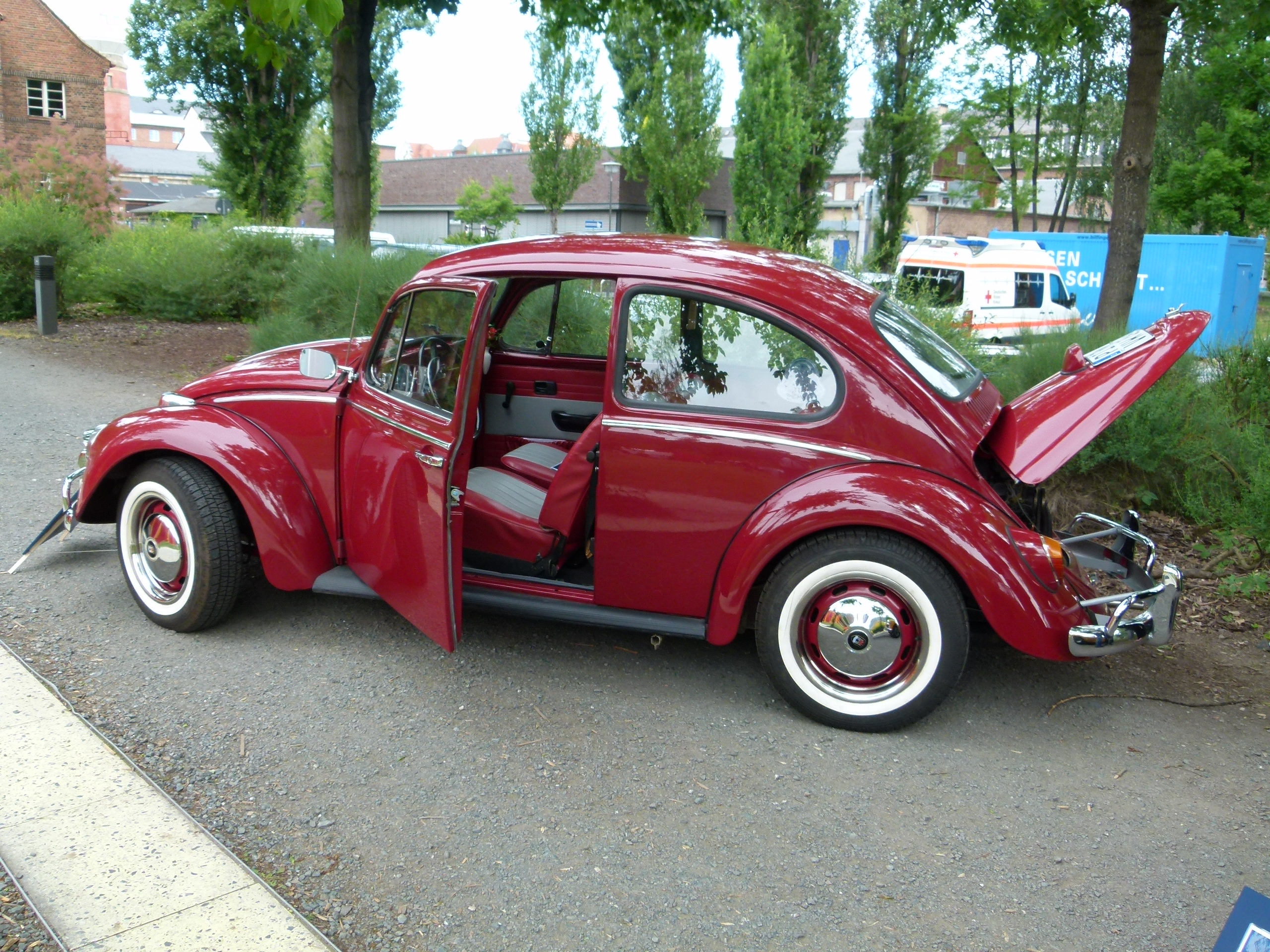 Volkswagen Käfer, 1967, (1. TUD Campus Classics, 9.6.2012, Dresden)